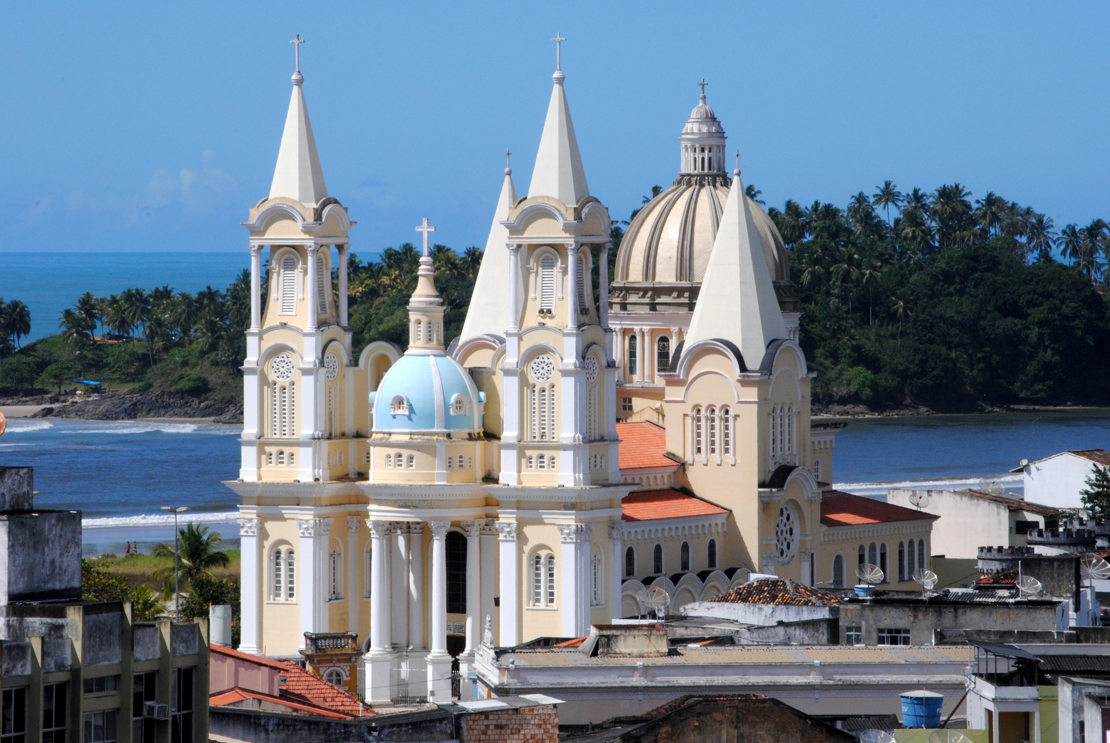 Ilhéus-Ba. Foto: Gabriel Carvalho - Setur